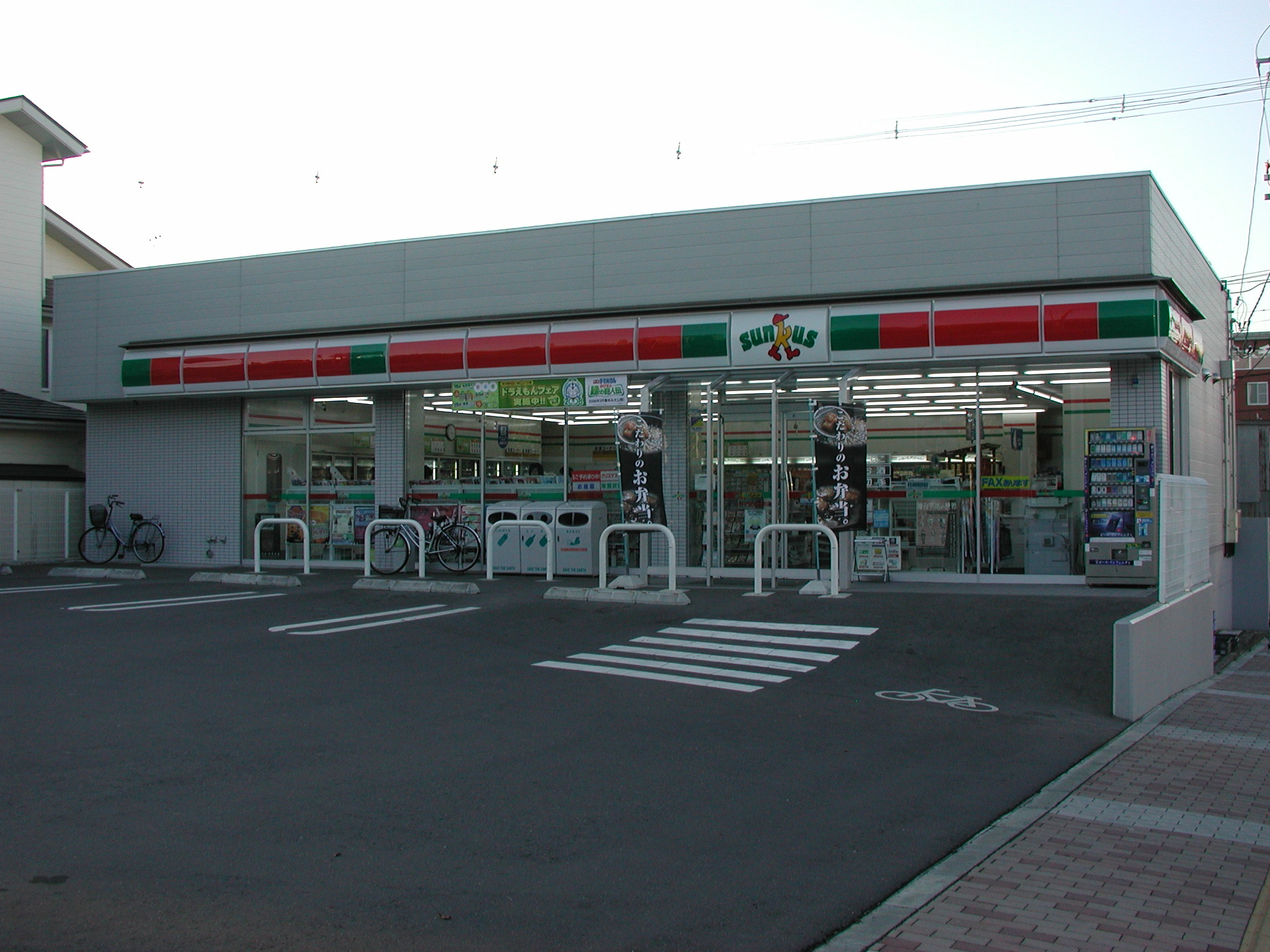 サンクス 八戸千葉学園前店